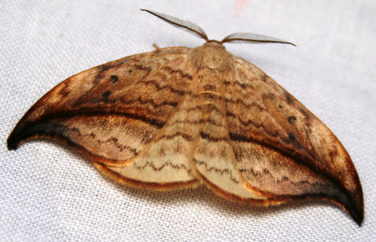 Or at least it looks just like this one